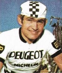 Charles Rouxel (1972), Sprint 72', Panini figurina n°98.